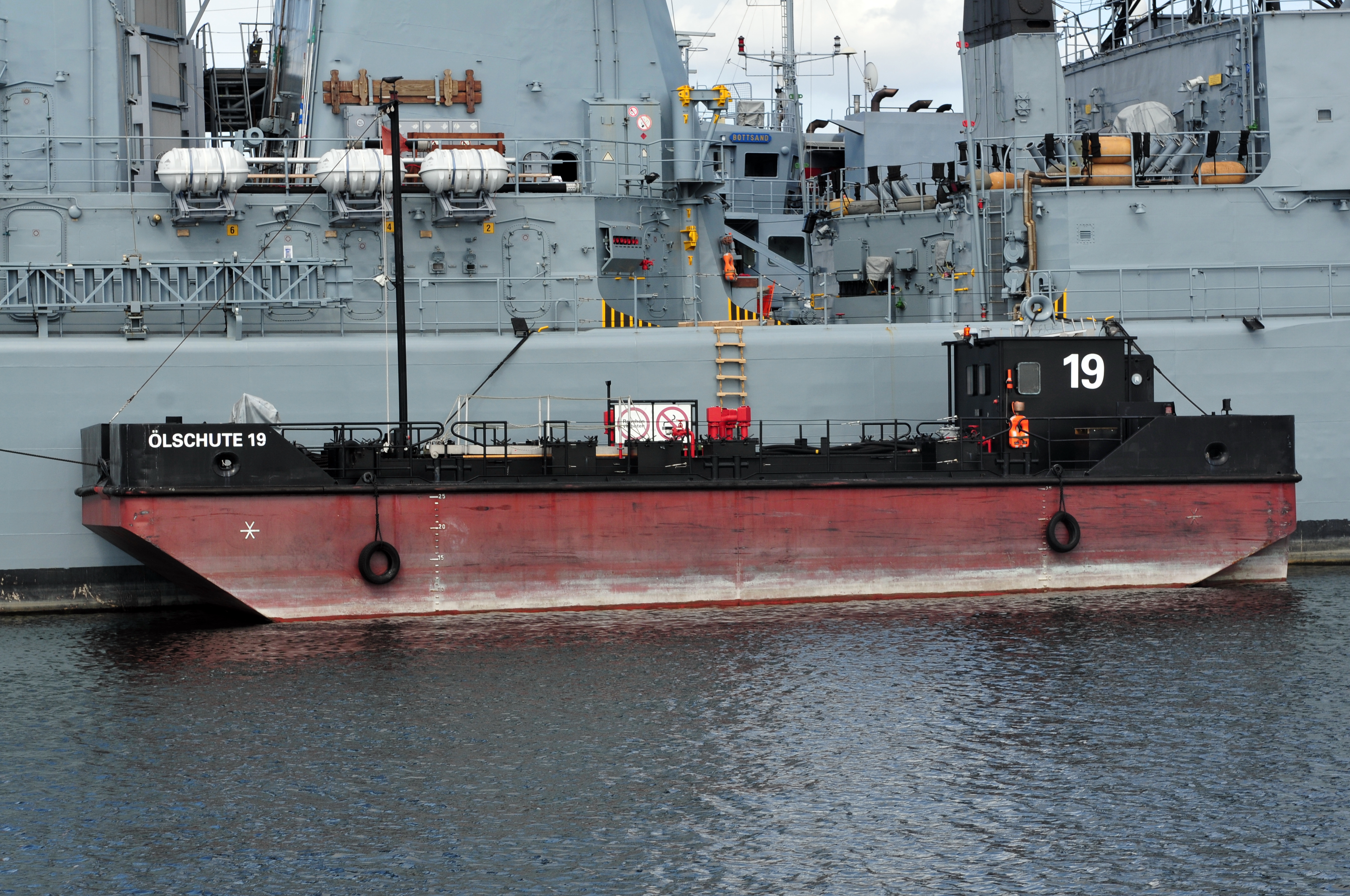 Landtagsprojekt Schleswig-Holstein; Marinestützpunktkommando Kiel